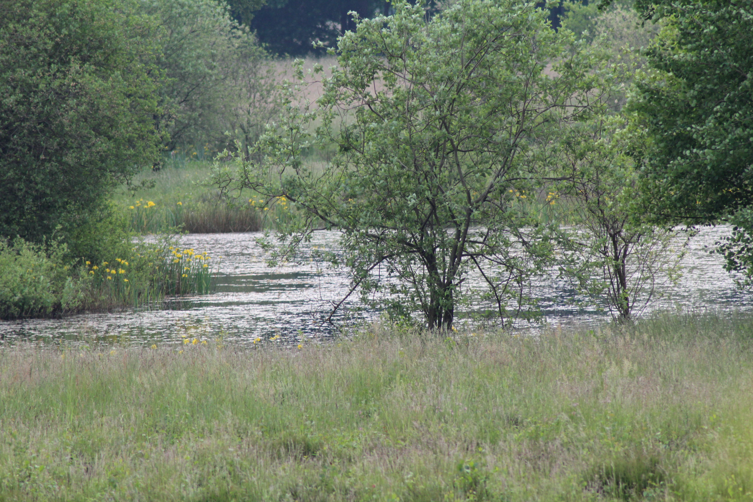 Das Weiße Moor in der Ortschaft Tonnenheide der Stadt Rahden (Westfalen) an einem ruhigen Frühlingsabend.